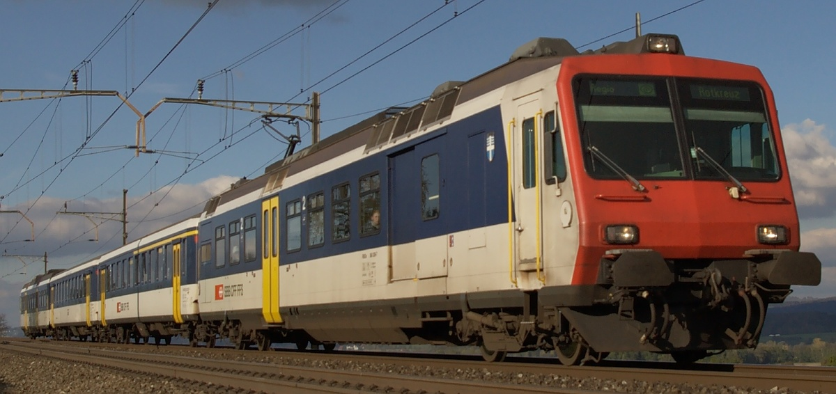 SBB NPZ zwischen Mühlau und Sins / SBB-CFF-FFS local train type NPZ between Mühlau and Sins